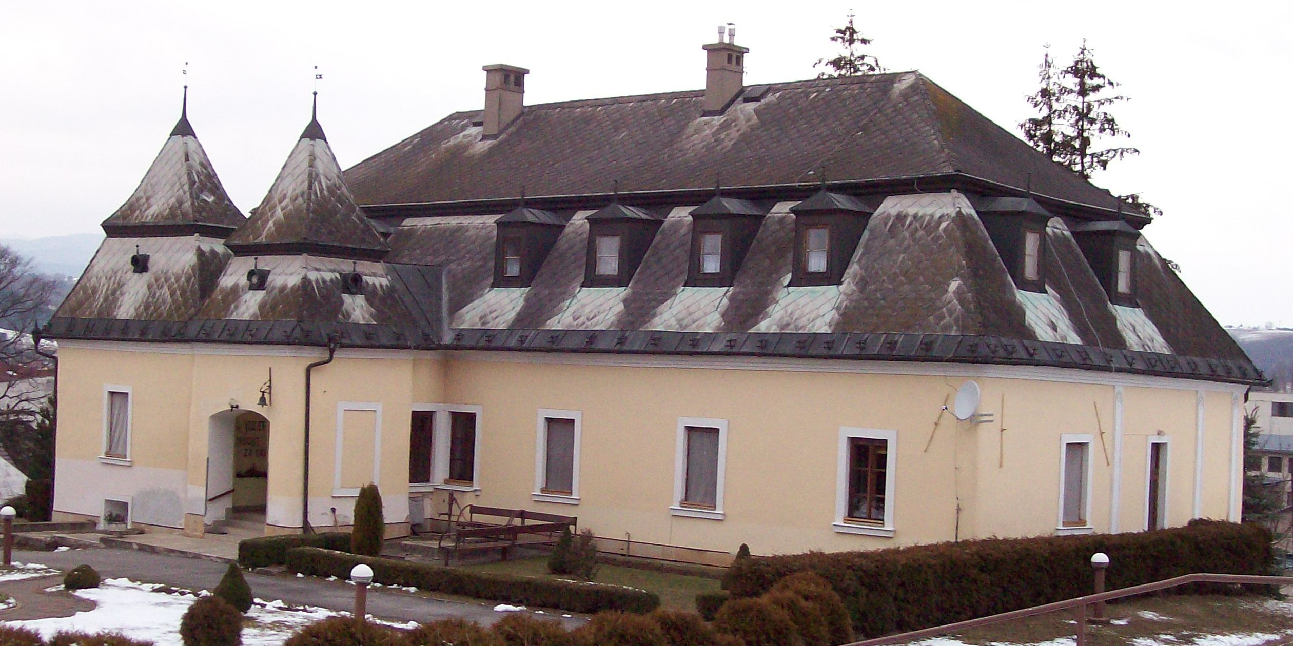 Horný kaštieľ, Kláštor sv. Jozefa